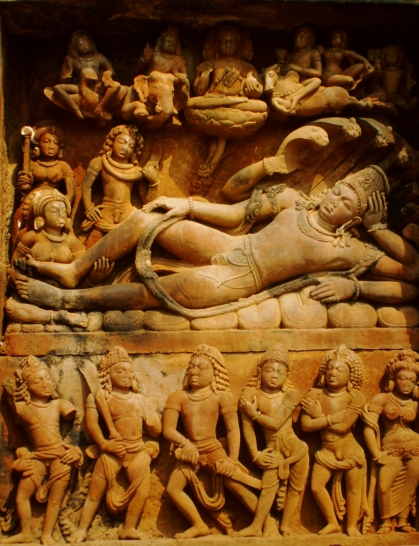 Deogarh, Dasavatara-Tempel, Vishnu auf Ananta